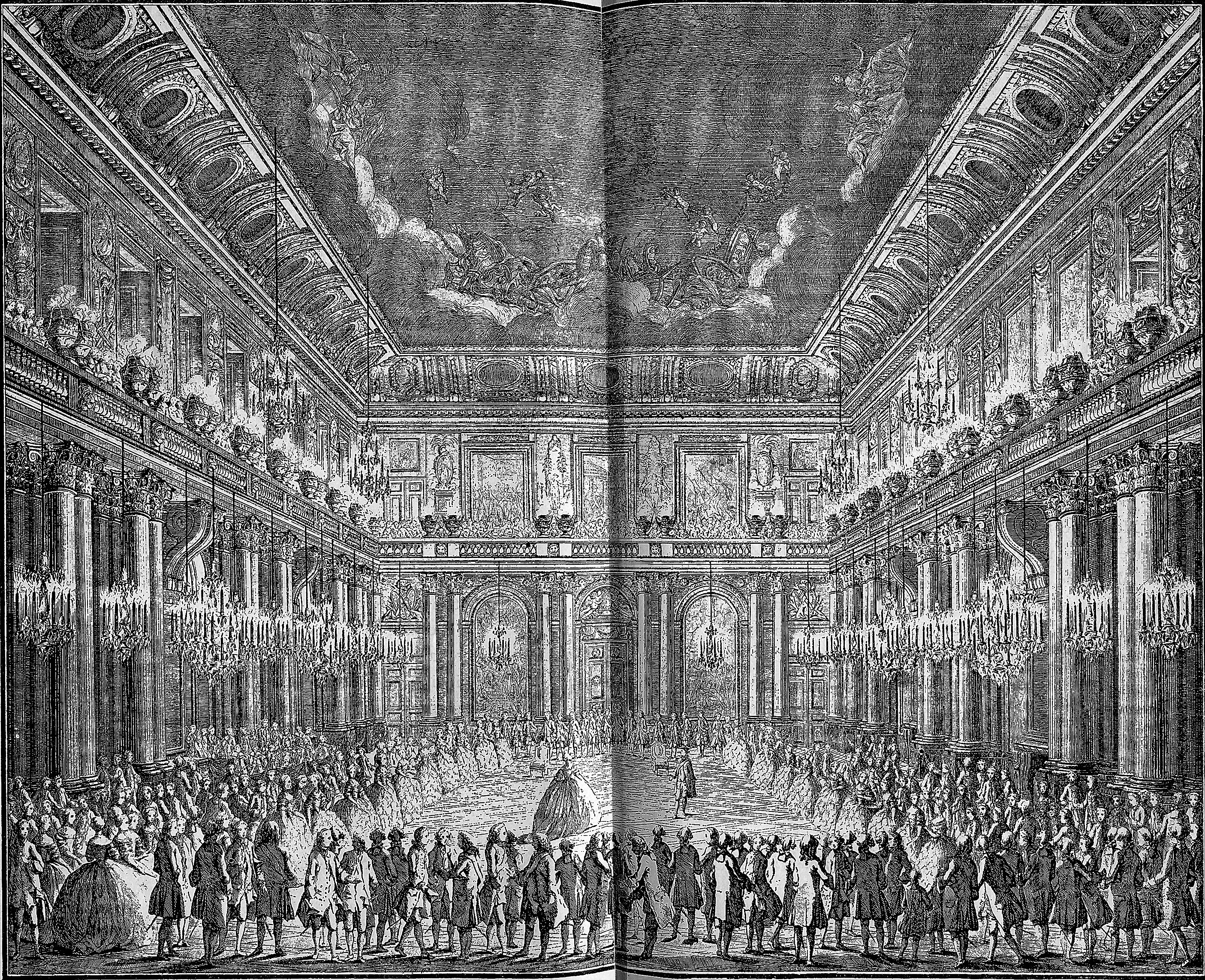 Bryllupsballet i Christiansborg Riddersal afholdt i anledning af Christian VIIs og Caroline Mathildes formæling 1766. The Wedding Ball in the Knights Hall in Christiansborg Palace in honour of the wedding between Christian VII og Denmark and Carolina Mathilda of Wales.